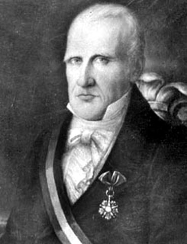 Retrato de Agustín Eyzaguirre, Vicepresidente de Chile/Presidente Interino (1826-1827)